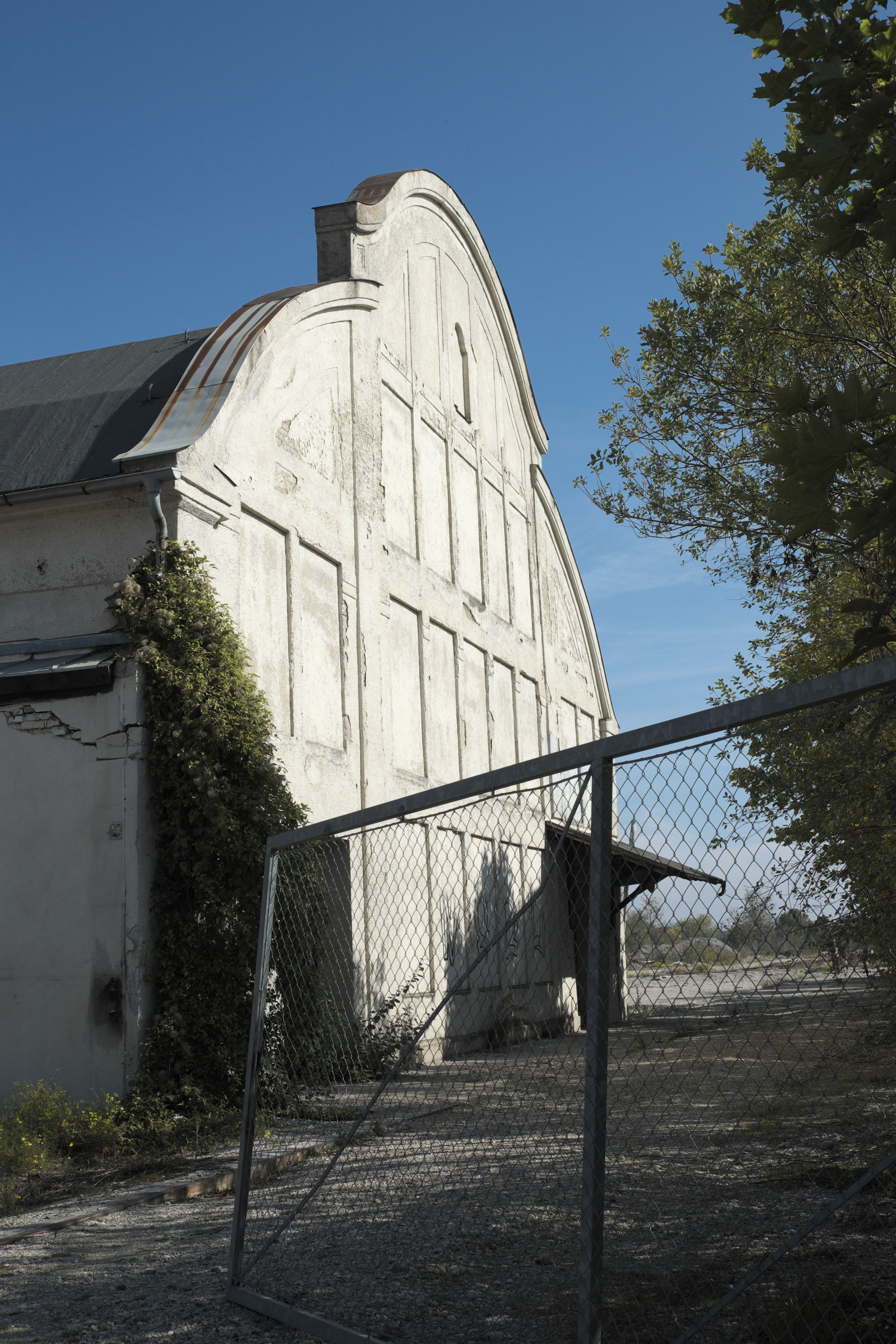 Fabrikhalle (Münchener Eggenfabrik) in Pasing im Stadtbezirk Pasing-Obermenzing in München (Bayern/Deutschland)